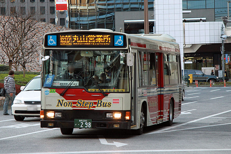 Kanto Bus 関東バス（元ケイビーバス。車体側面上部に「KB BUS CO.,LTD.」の表記が残る）